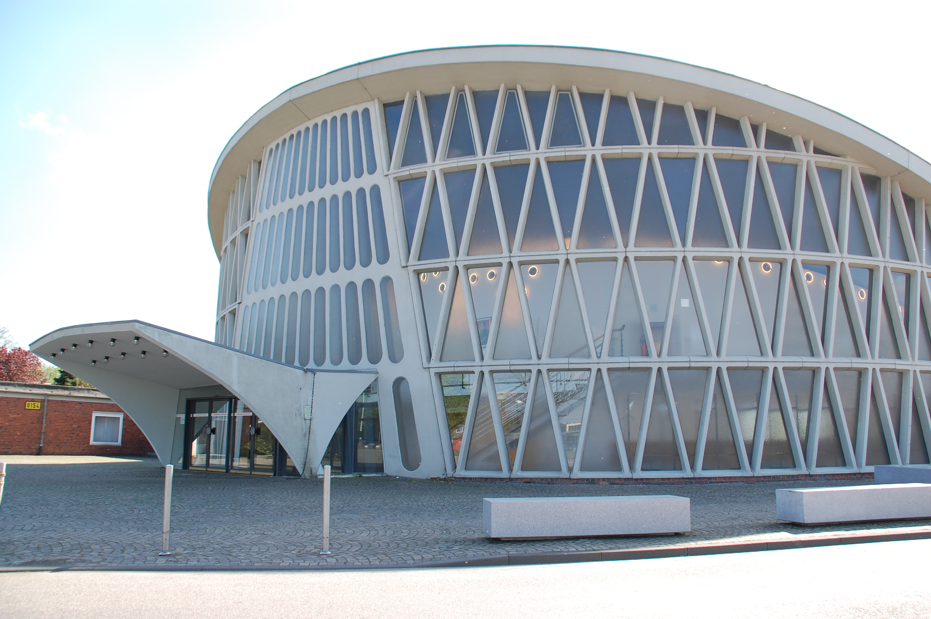 Feierabendhaus in Chemiepark Knapsack, Huerth